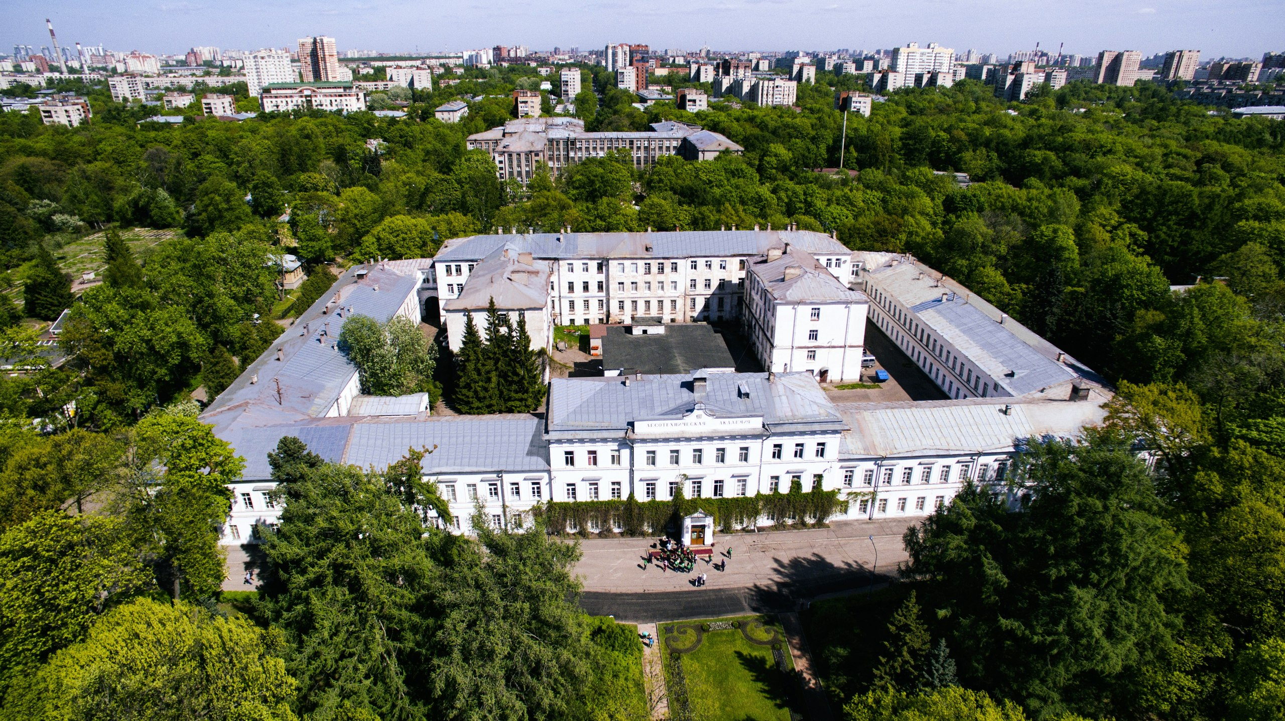 1 учебный корпус лесотехнического университета